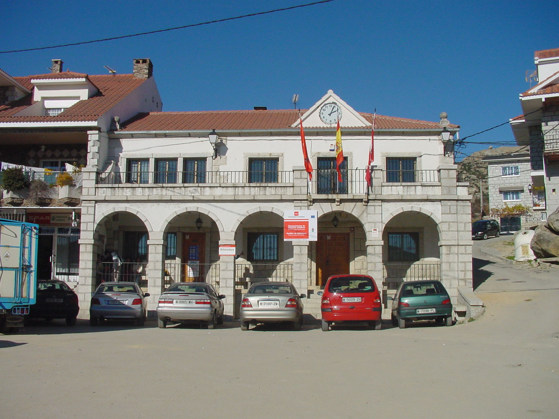 Ayuntamiento de Valdemanco.